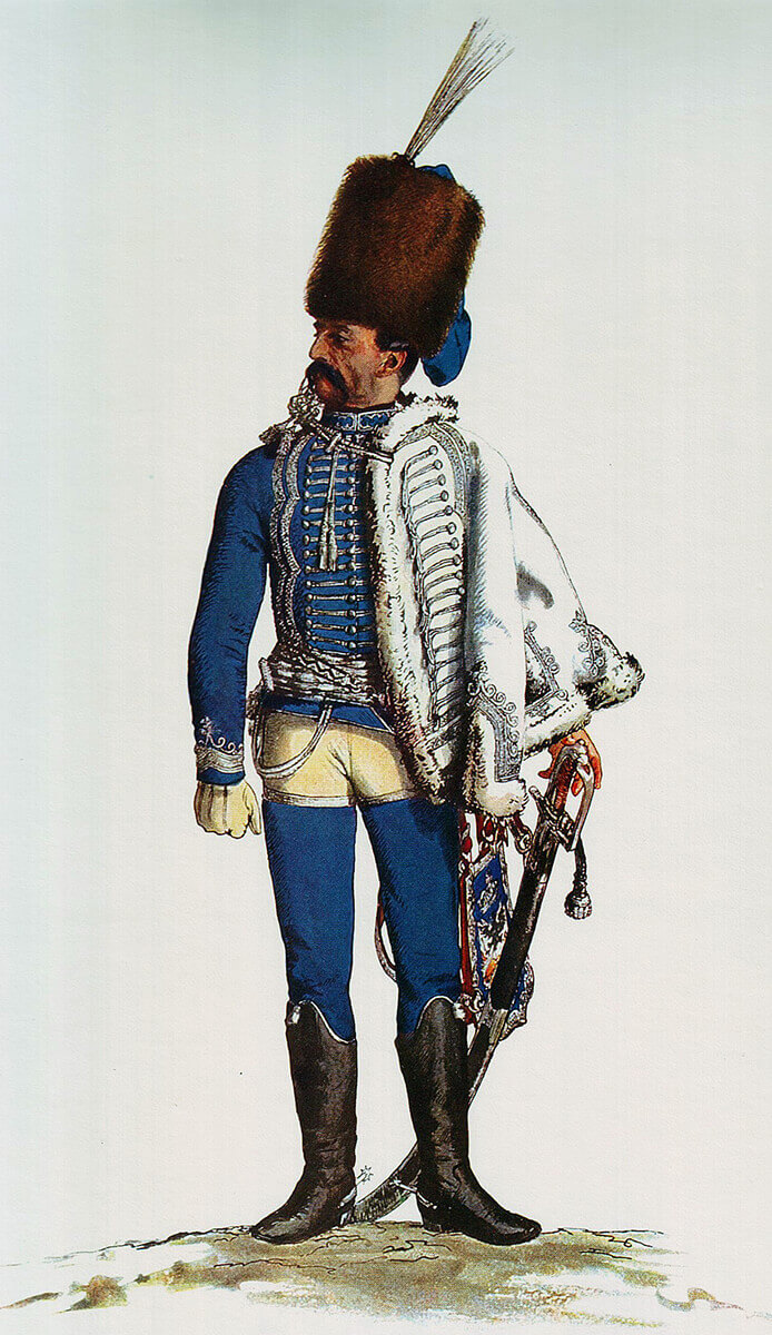 Hussard prussien du régiment Puttkamer (n°4), A. Menzel.